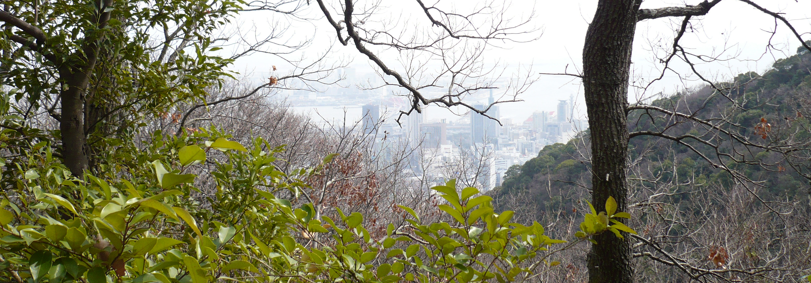 本丸からの眺望